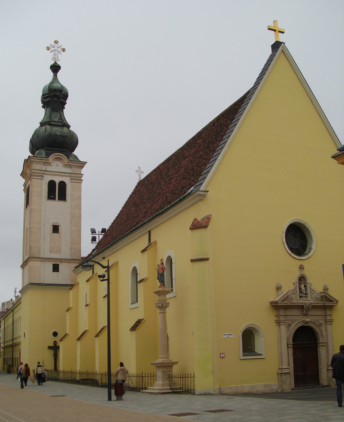 Árpád-házi Szent Erzsébet Ferences templom (Szombathely, Aréna utca 1/A.)